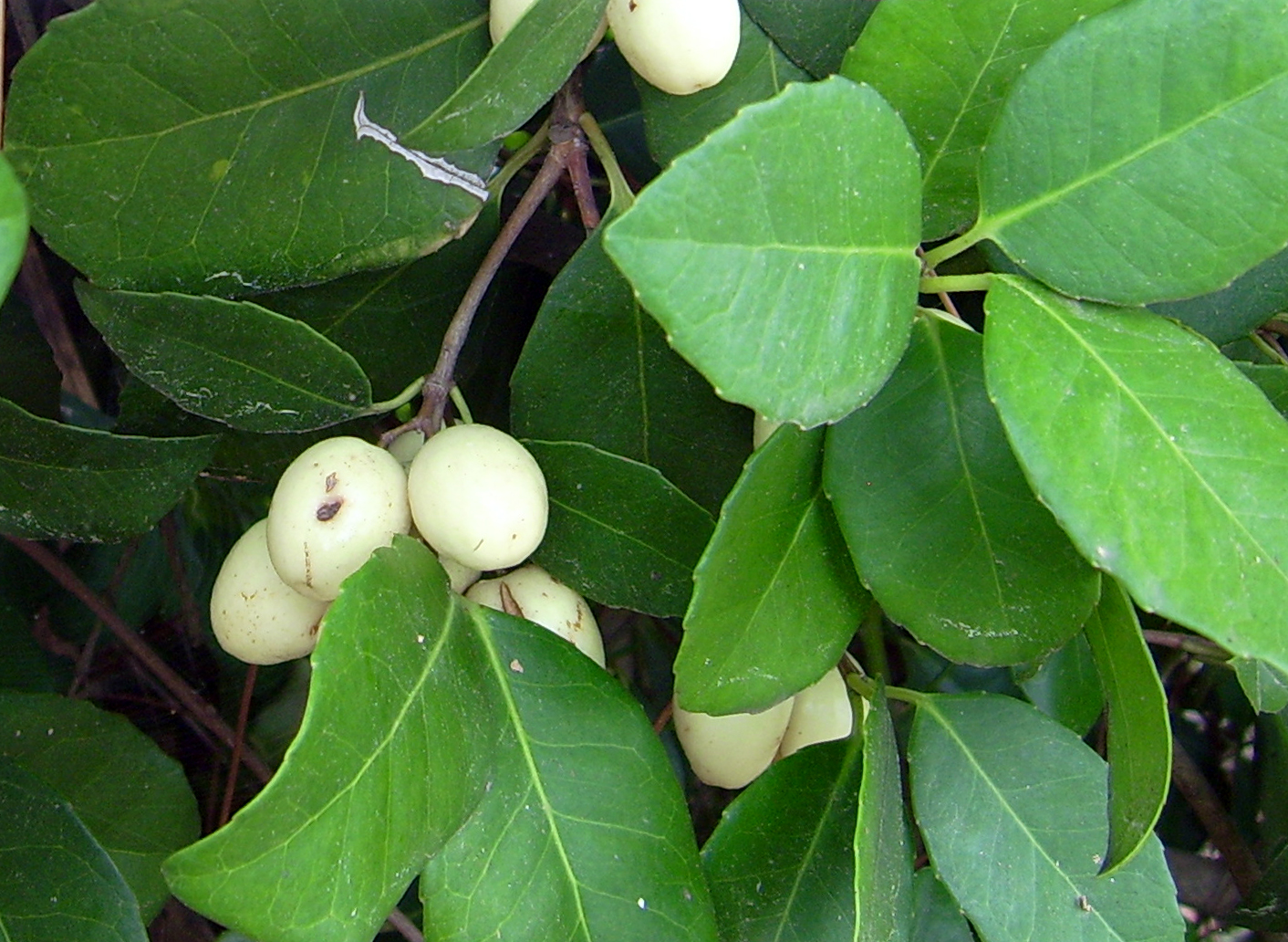 Elaeodendron croceum, familia Celastraceae, en Jardí Botanic Marimurtra